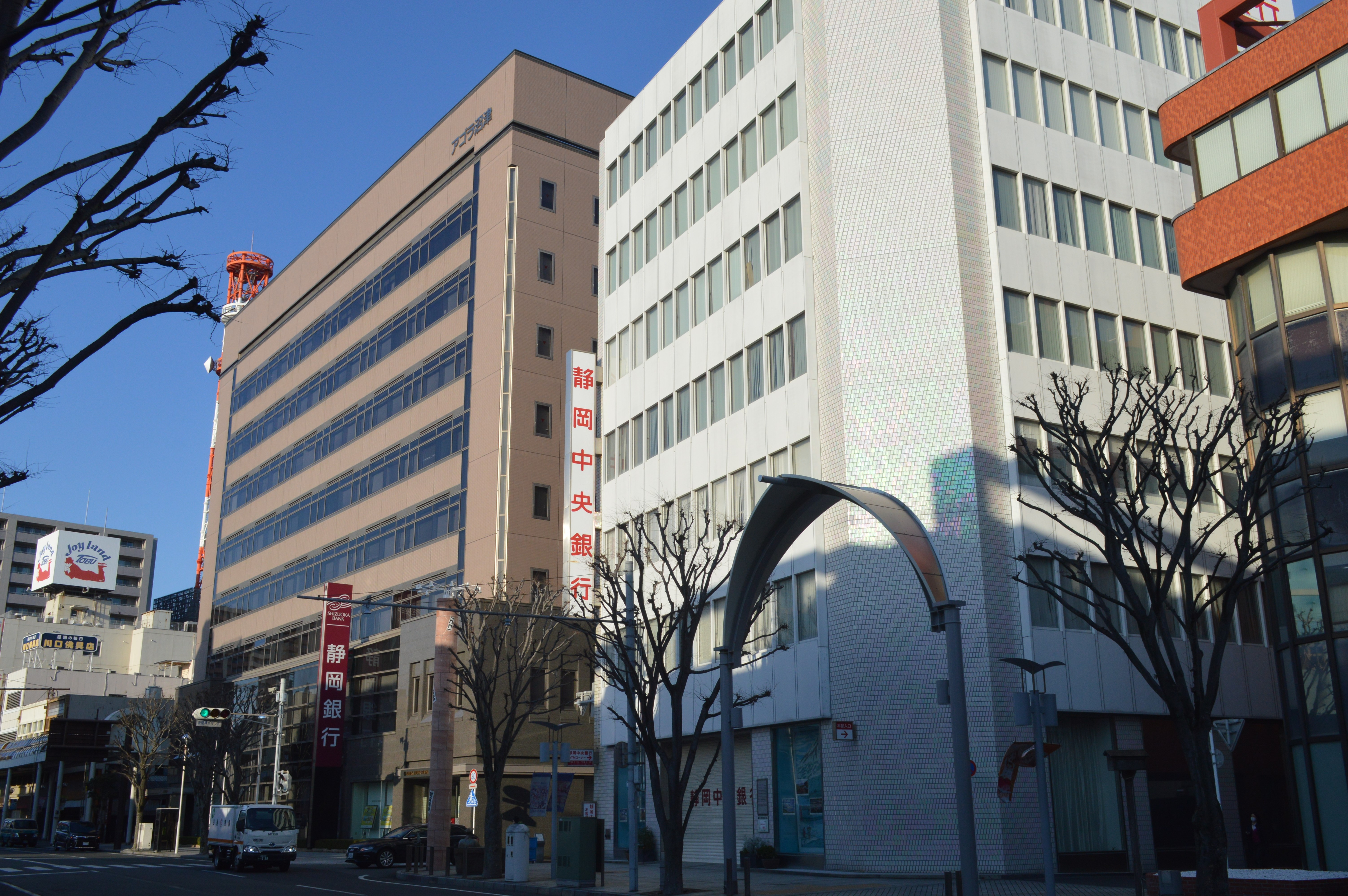 静岡県沼津市大手町4丁目にある静岡銀行沼津支店と静岡中央銀行本店。